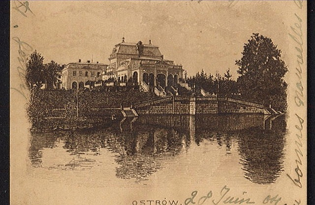 Палац: Палац родини Баворських